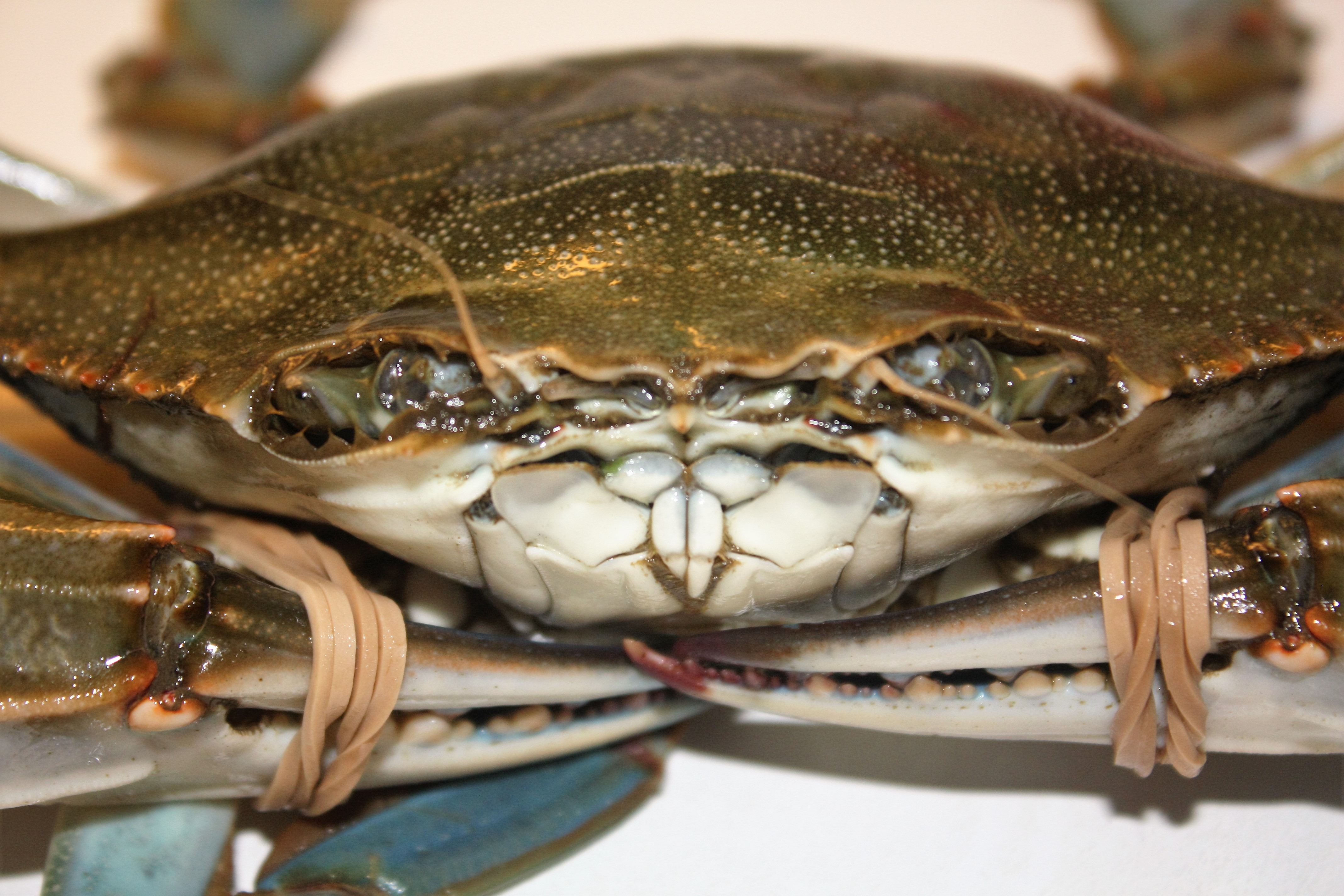 Schwimmkrabbe